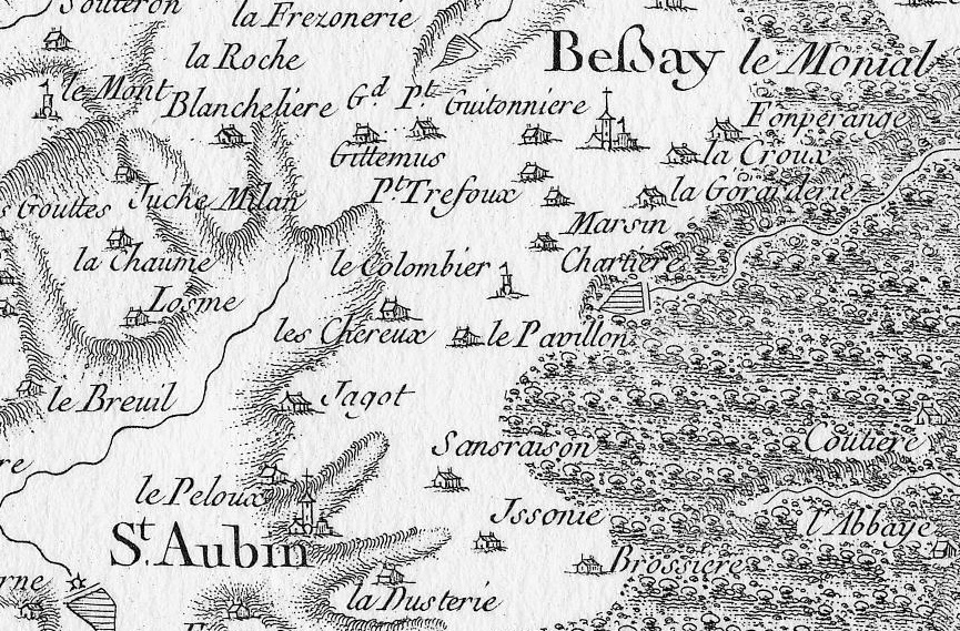 carte de Cassini XVIIIème siècle